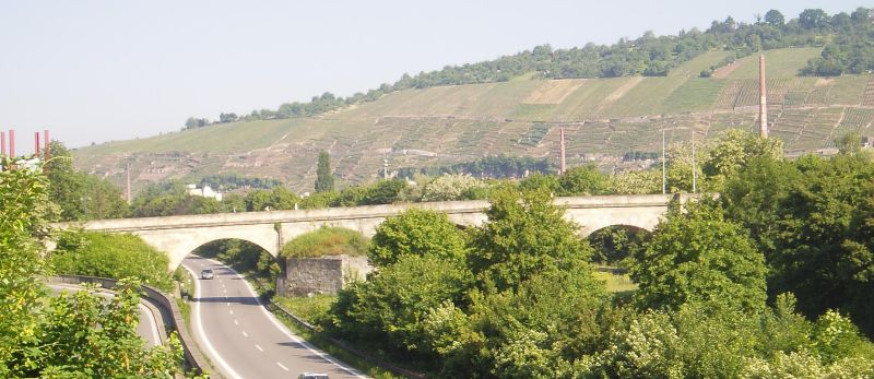 Esslingen am Neckar - Pliensaubrücke Fotografiert: selbst